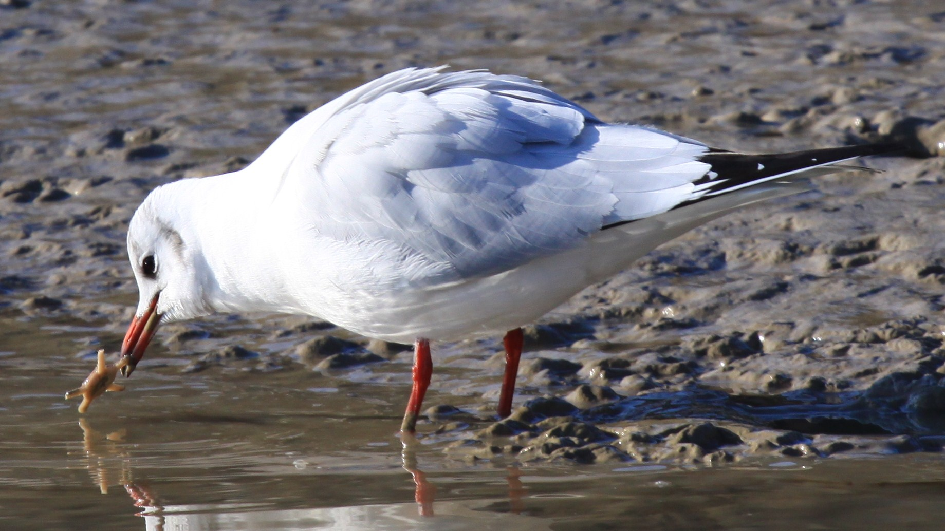 Vue rapprochée d' une mouette rieuse qui se nourrit d' une ophiure dont elle avale les bras en les coupant avec son bec. Une ophiure est un animal marin invertébré qui fait partie de l' embranchement des échinodermes. Elle fait partie de la même famille que l' étoile de mer. Cette photographie a été prise à marée basse dans le Port de Plaisance des Minimes à La Rochelle (France).